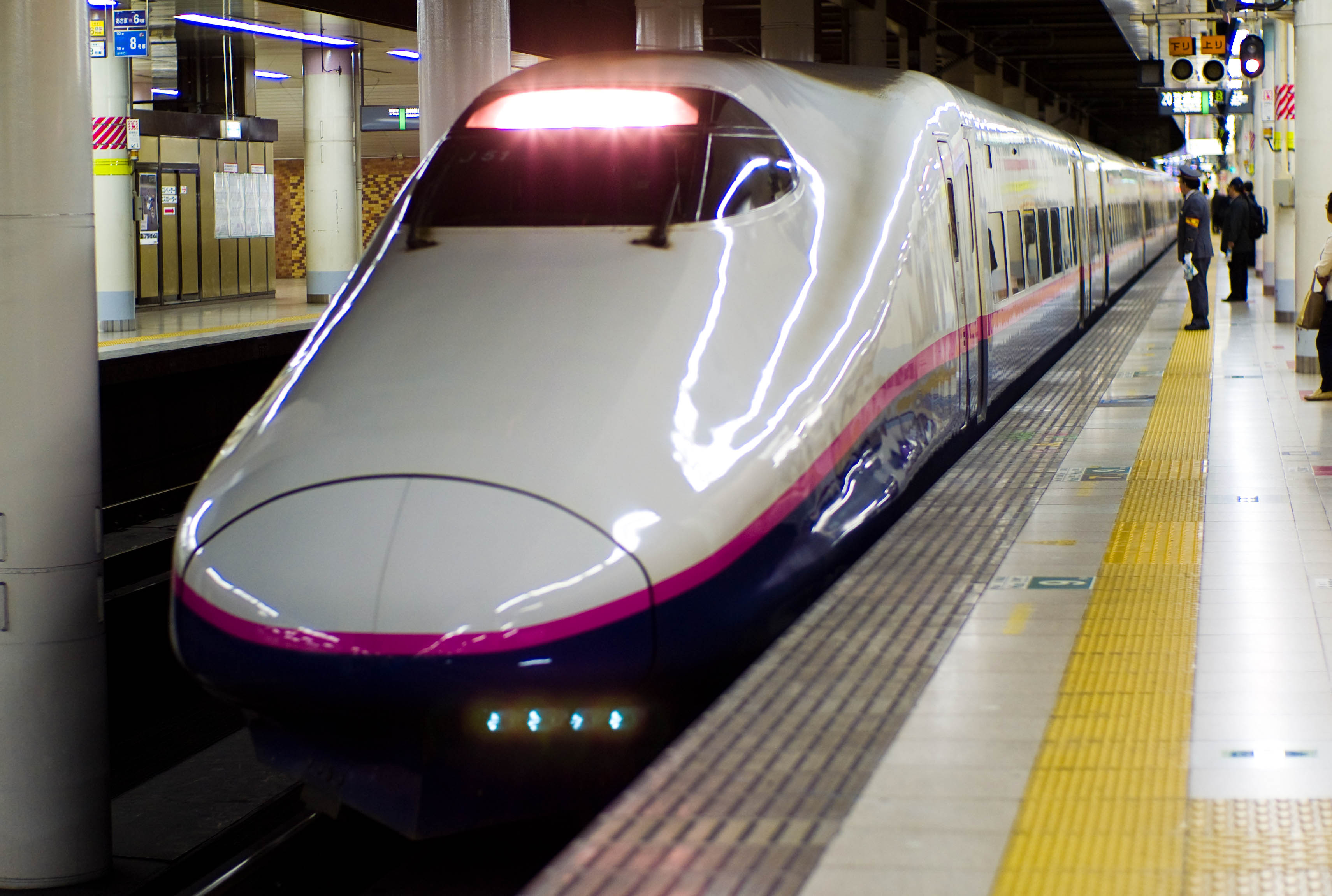 Hayate (Shinkansen)